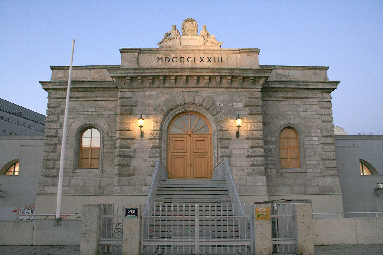 Die Alte Schieberkammer (errichtet 1873) des ehemaligen Wasserreservoirs auf der Schmelz, im XV. Bezirk in Wien / The Alte Schieberkammer (old mid-gate chamber, built 1873) of the former sweetwater-reservoir in the 15th district of Vienna